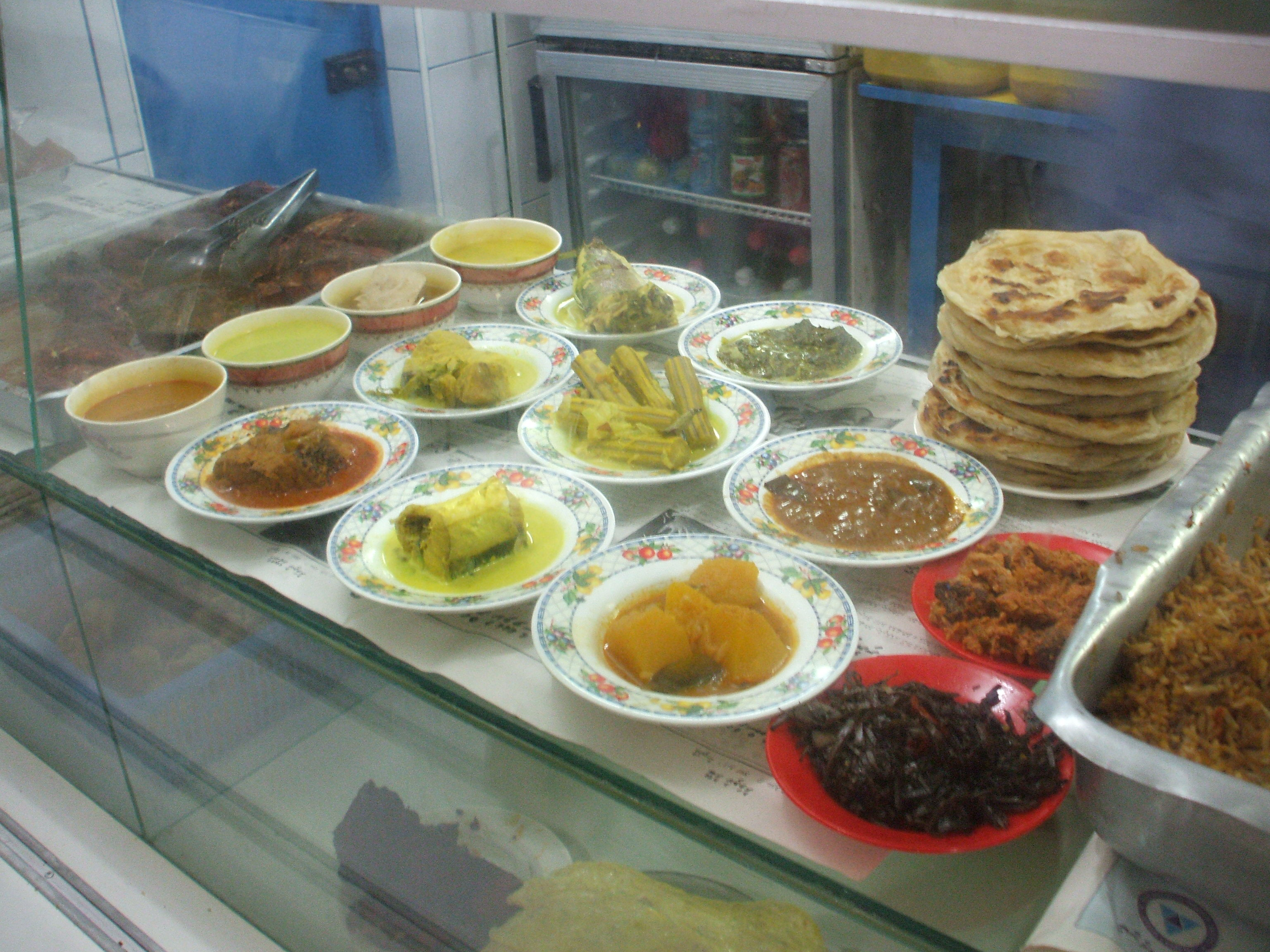 മാലദ്വീപിലെ ഭക്ഷണം - കേരളത്തിലുള്ള സംഭവങൾ തന്നെ. മലയാളി അവിടെ പോയാൽ പട്ടിണീ കിടക്കില്ല. ഞാൻ എടുത്ത പടം.